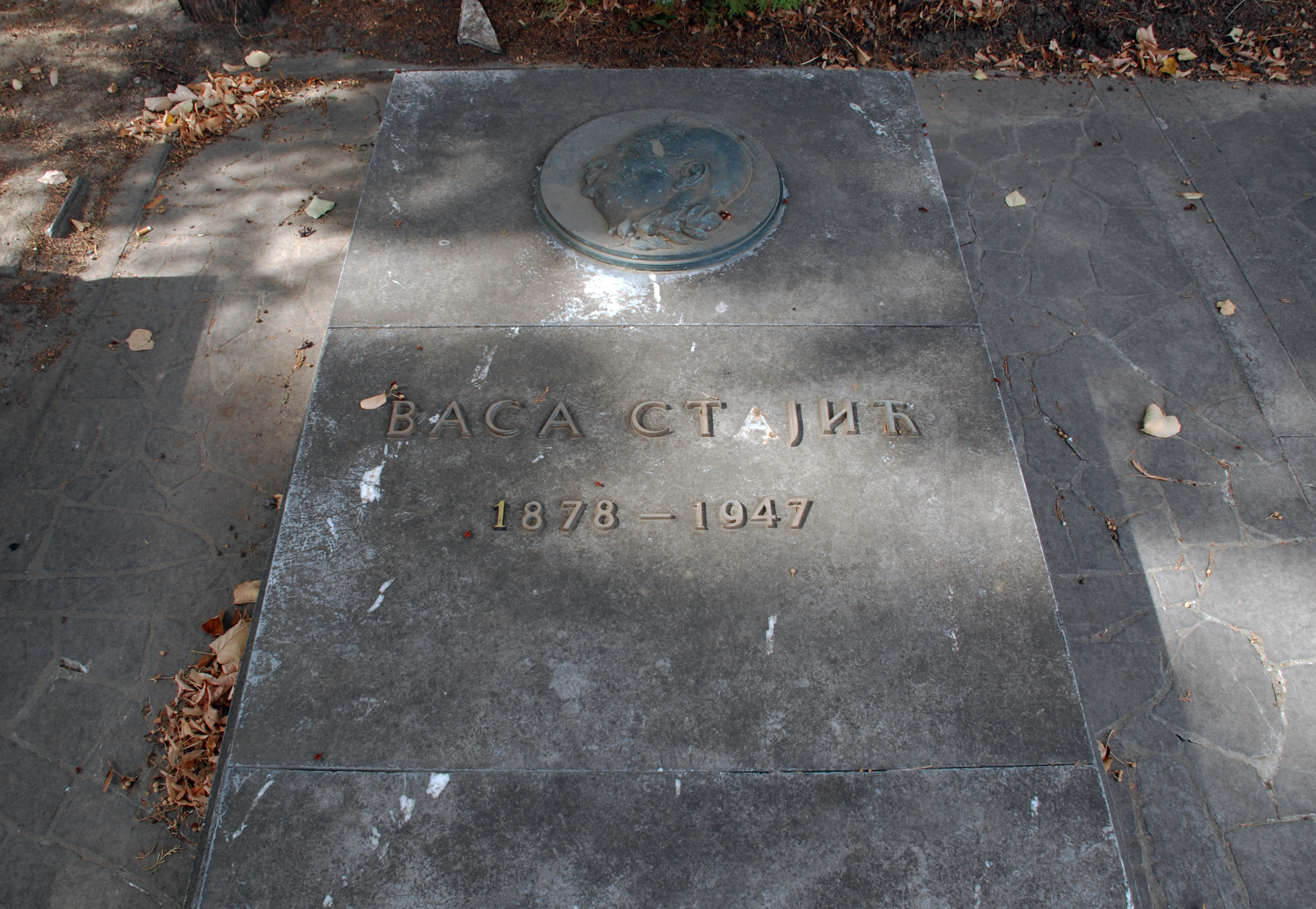 1878-1947, професор и писац, историчар Новог Сада, уредник више часописа, председник Матице српске